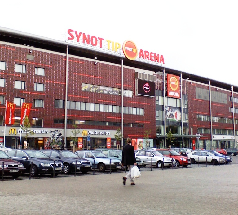 Stadium